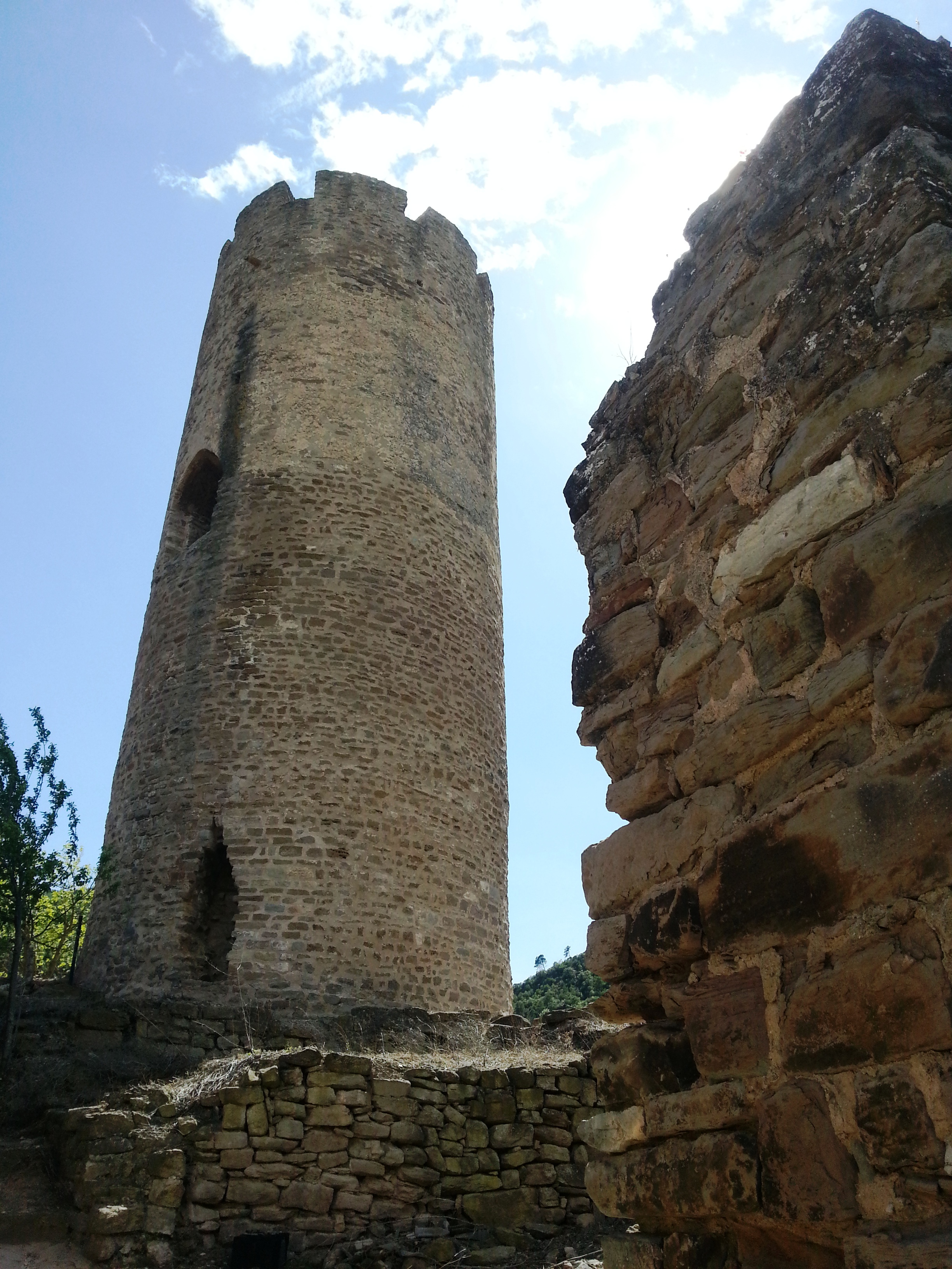 Torre de guaita de Coaner vista des de les runes del castell de Coaner